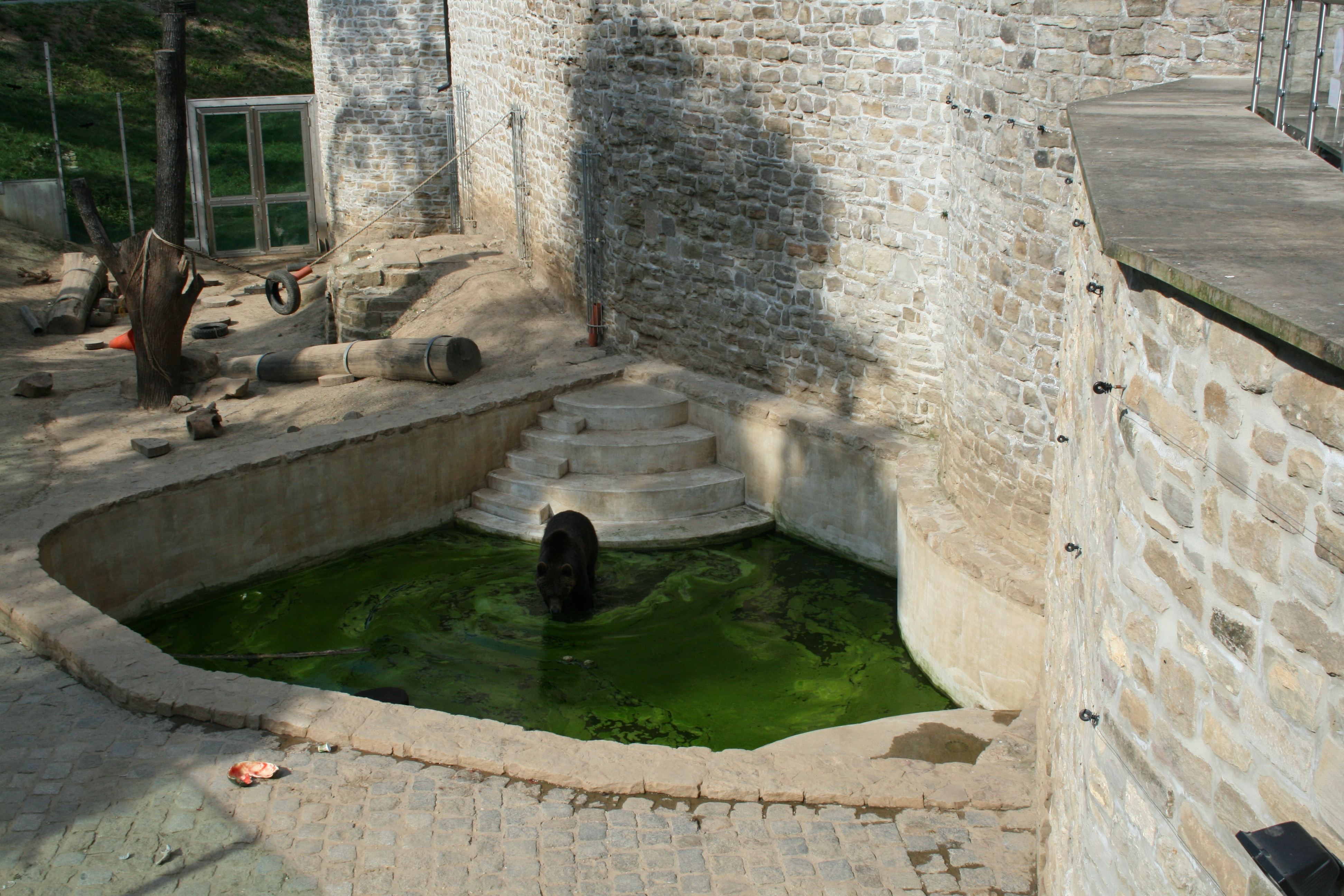 Schloss Droyßig - Bärenzwinger